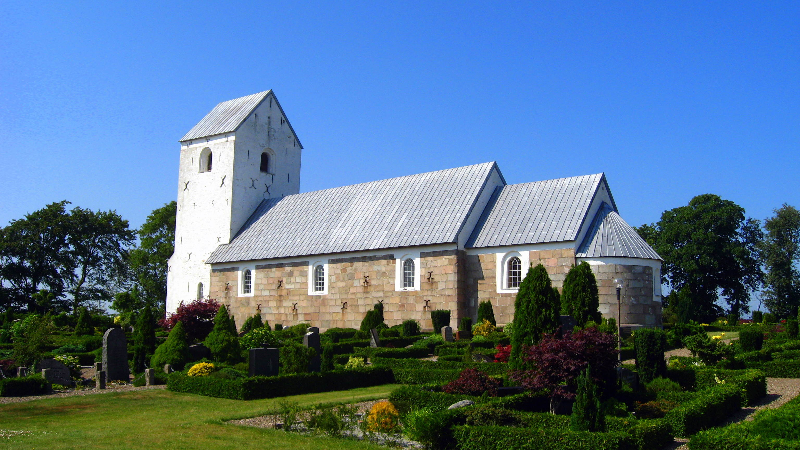 Haverslev Kirke, Jammerbugt Kommune